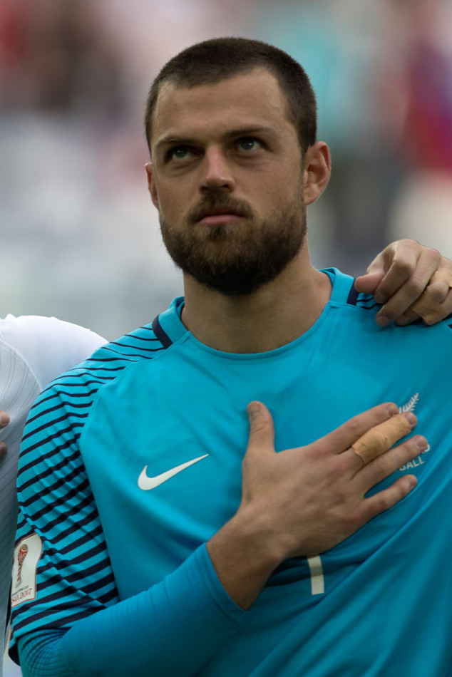 Россия - Новая Зеландия